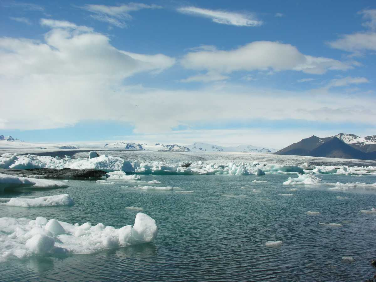 Iceland, Jökulsárlón